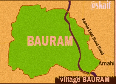 map of Bauram Darbhanga